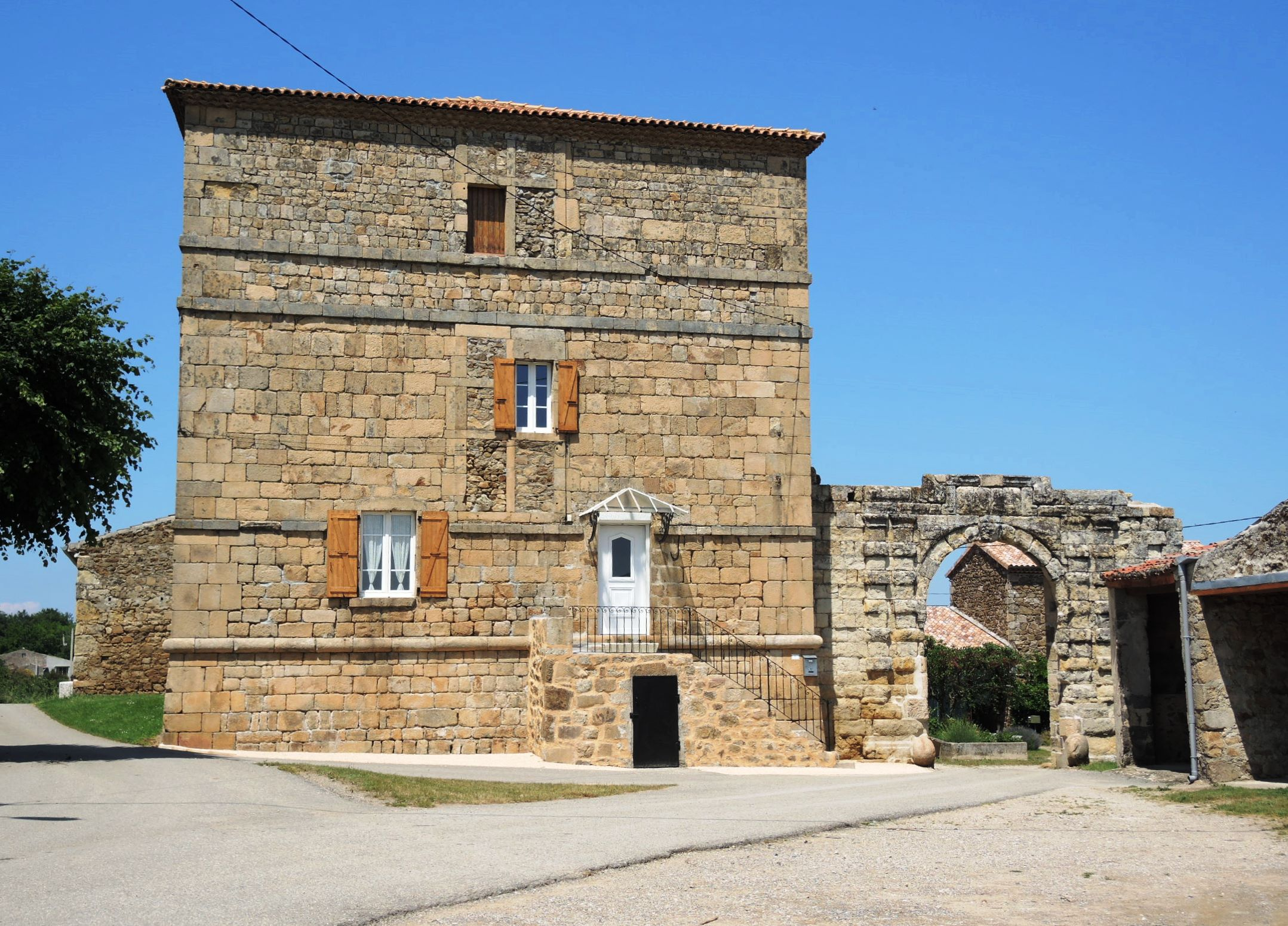 Bogy détail